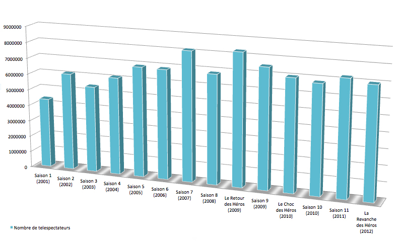 Graphique des audiences de Koh-Lanta